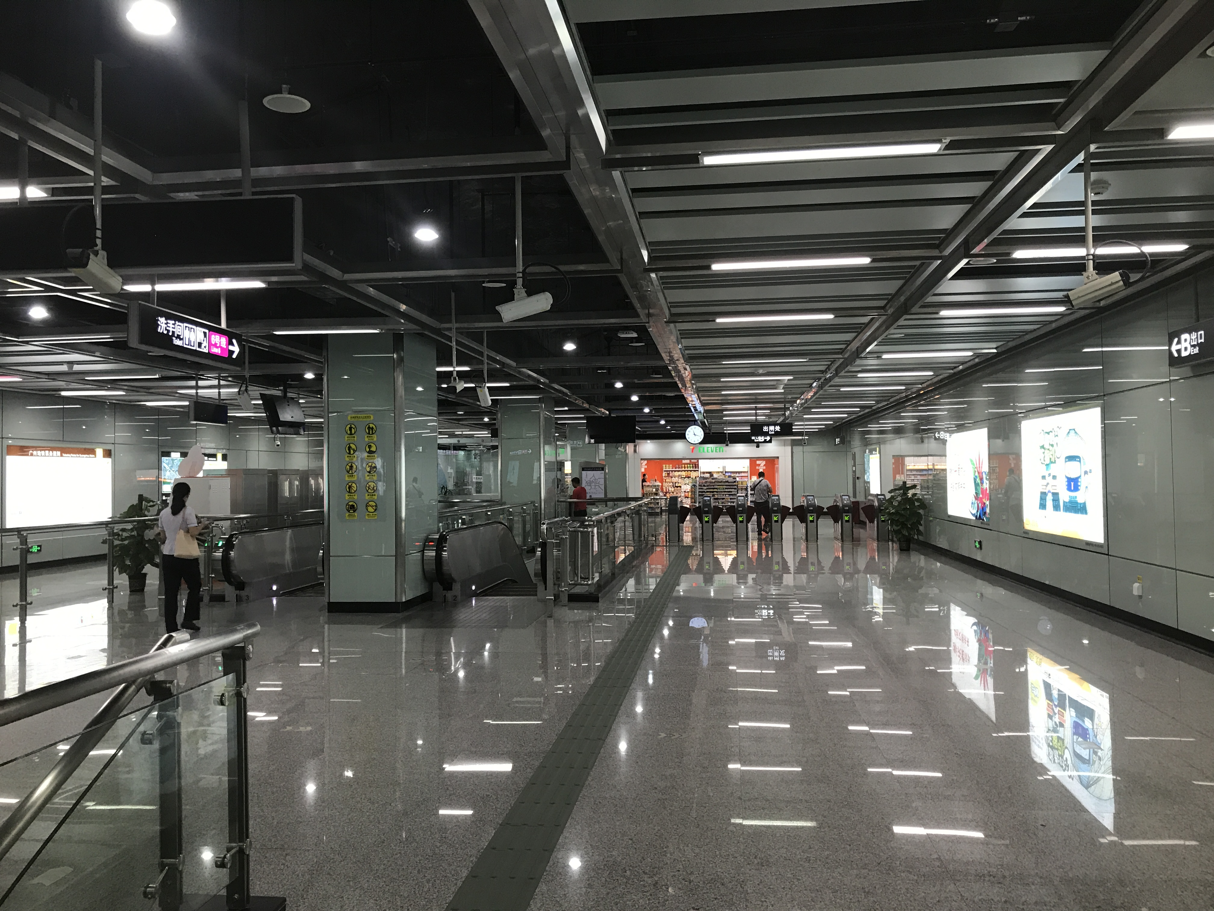 广州地铁柯木塱站